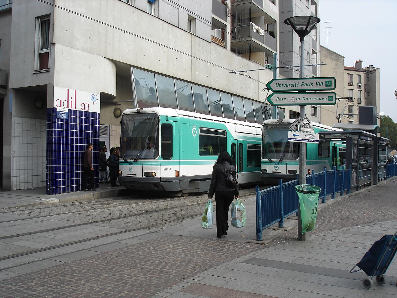 Station "Basilique de Saint-Denis"